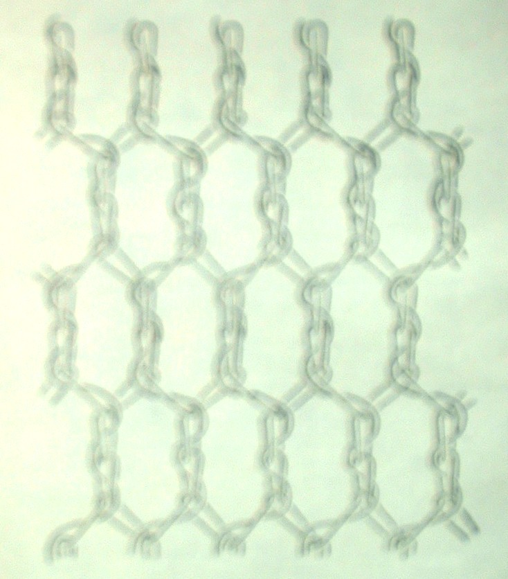 Schema: Tüllbindung